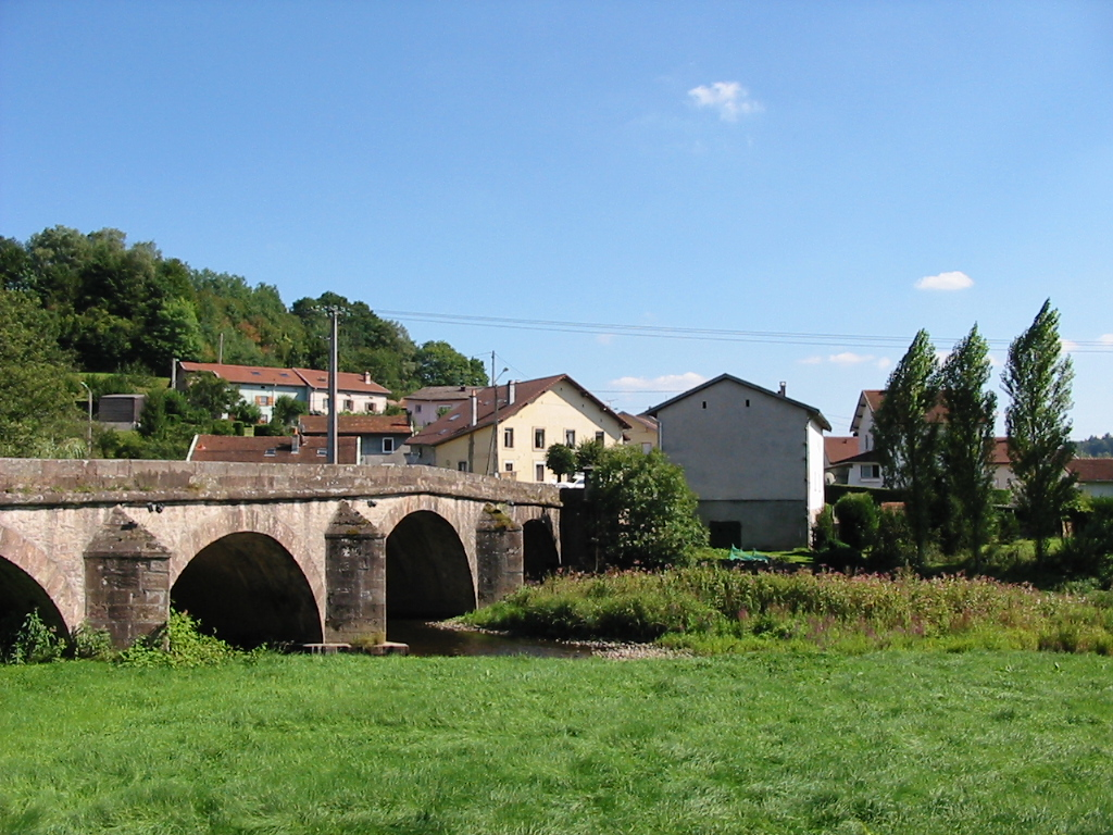 Jarménil (département des Vosges, France) Le pont sur la Vologne.